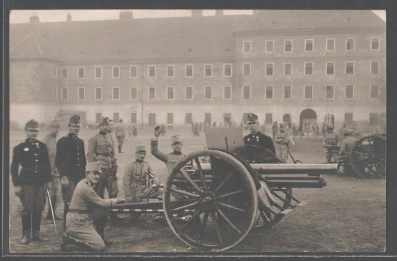 k.u.k. Feldartillerie beim Geschützexerzieren mit der 8 cm Feldkanone